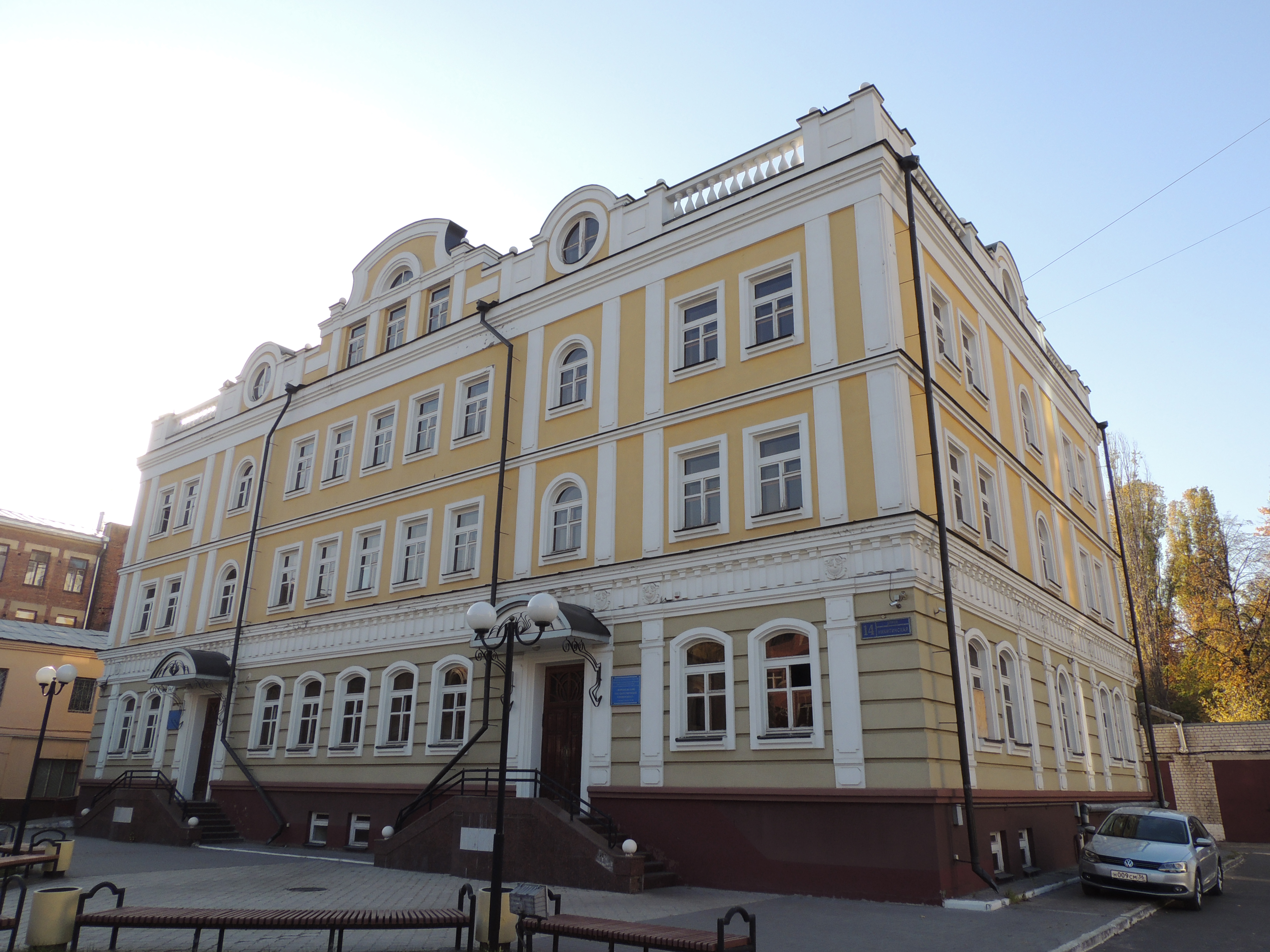 Жилой дом (Воронежская область, Воронеж, никитская улица, 14)